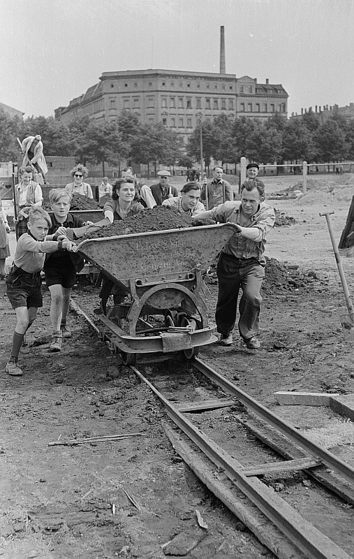 Original image description from the Deutsche FotothekFreiwillige Arbeitshelfer auf der Baustelle des Sportforums an der Stalinallee (heute: Jahnallee)